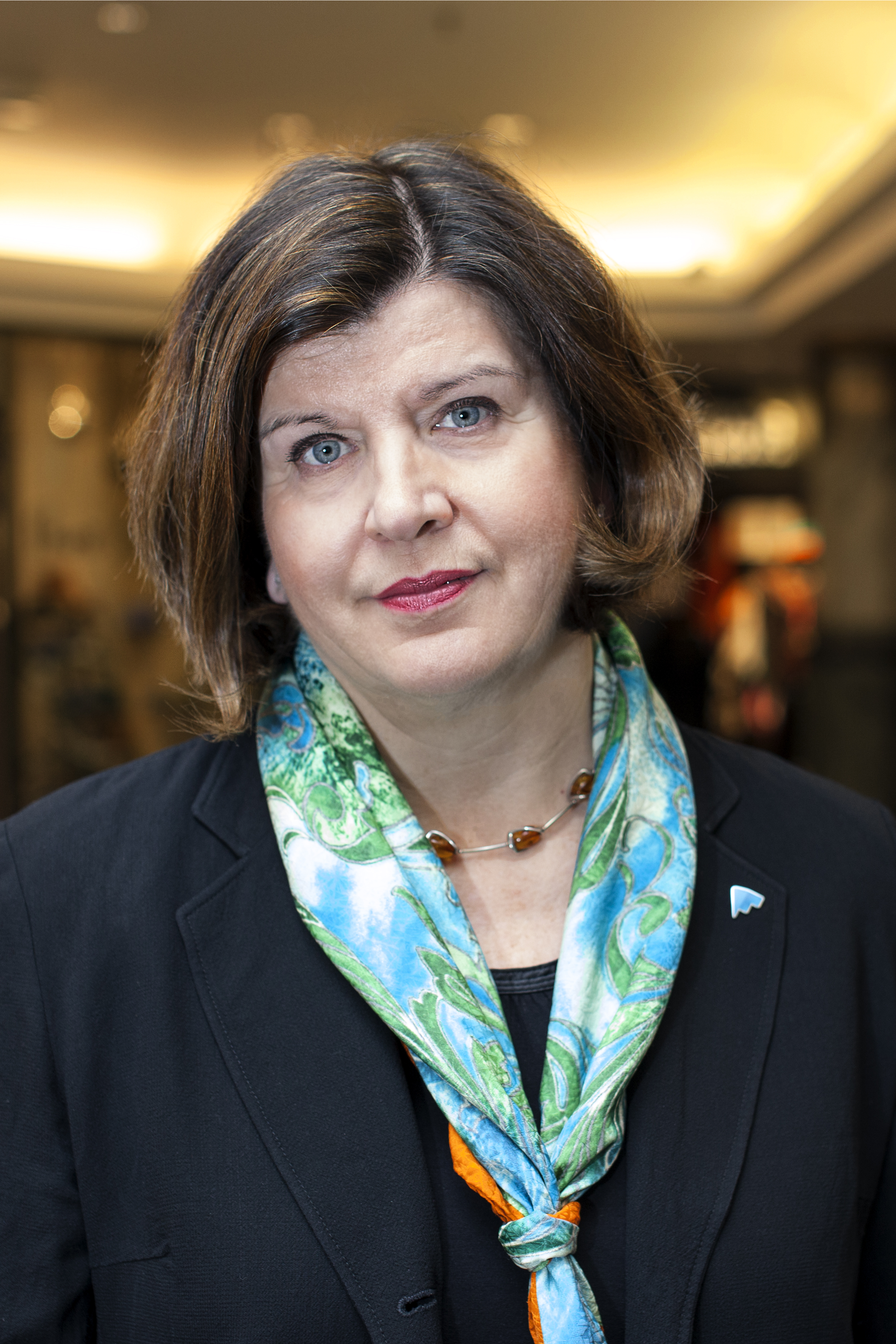 Forbrukerrådets direktør / Foto: Kjell Håkon Larsen / bildet er til fri bruk ved kreditering